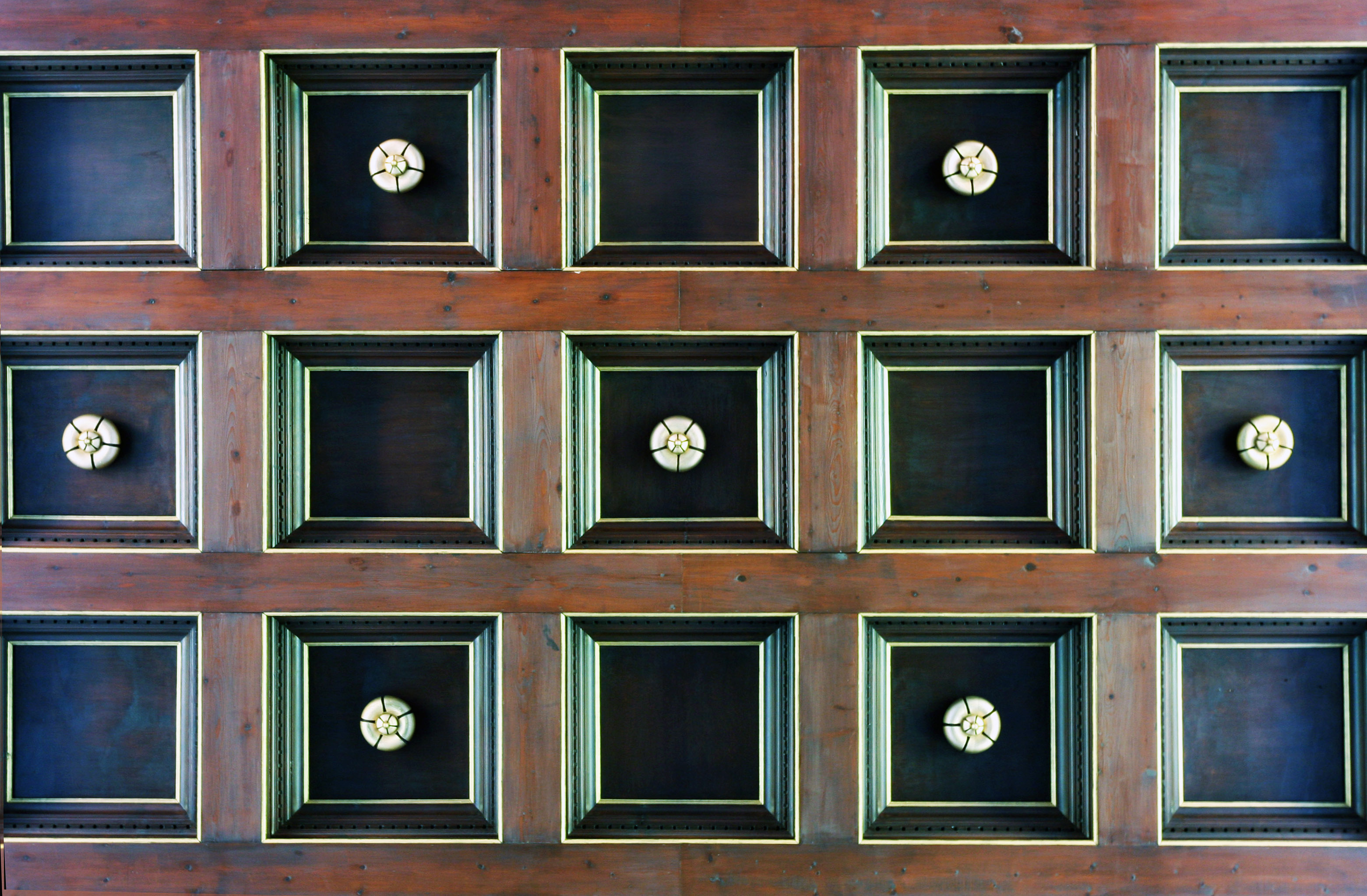 Römisch-katholische Pfarrkirche St. Franziskus Wetzikon